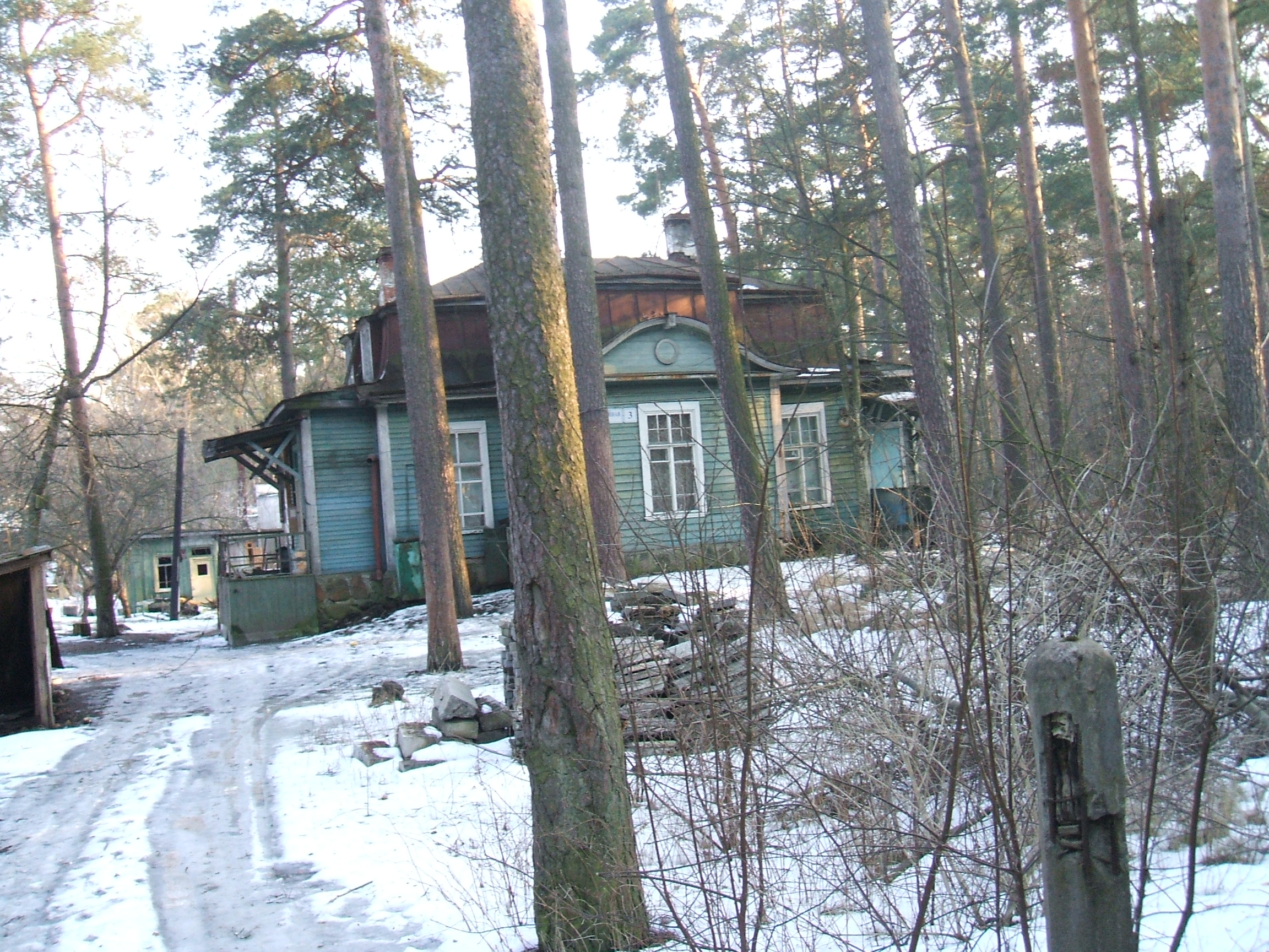 Оранжерейная д.3 в Сестрорецке (дача Дворжецкого)